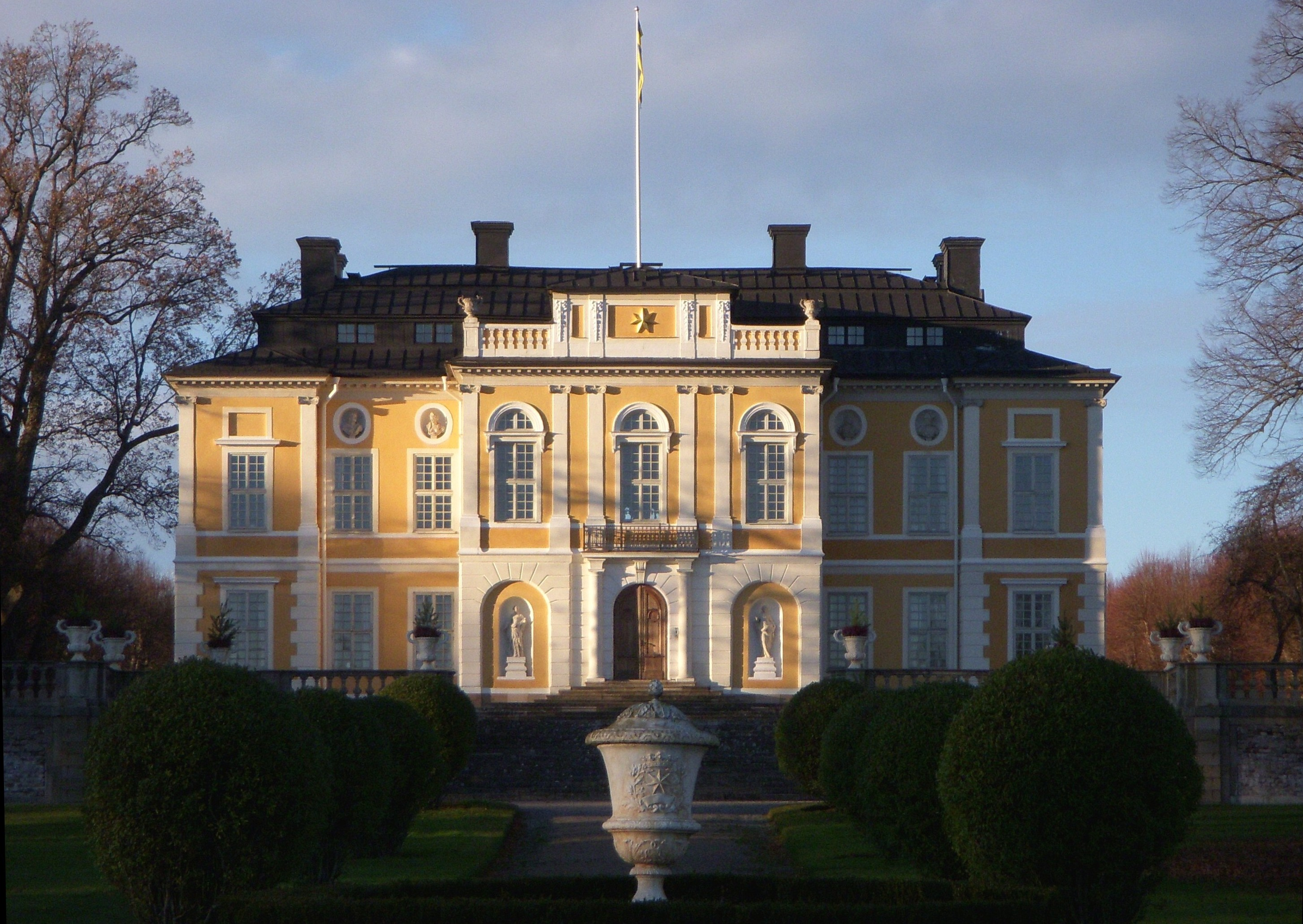 Steninge slott